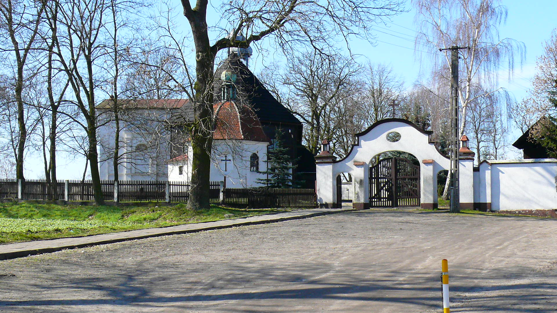 Łódź (pow. poznański), kościół pw. św. Jadwigi